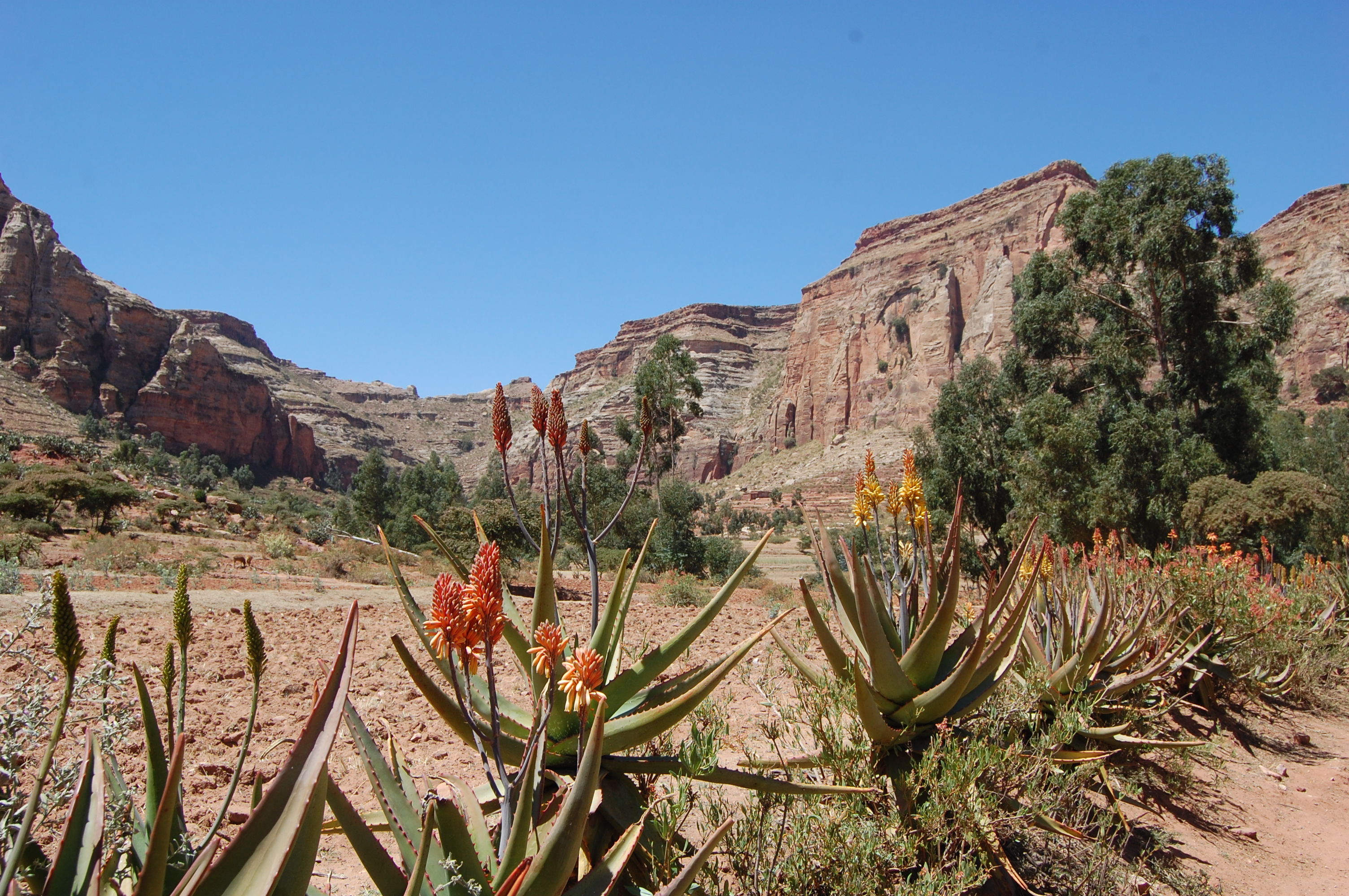 TESFA trek